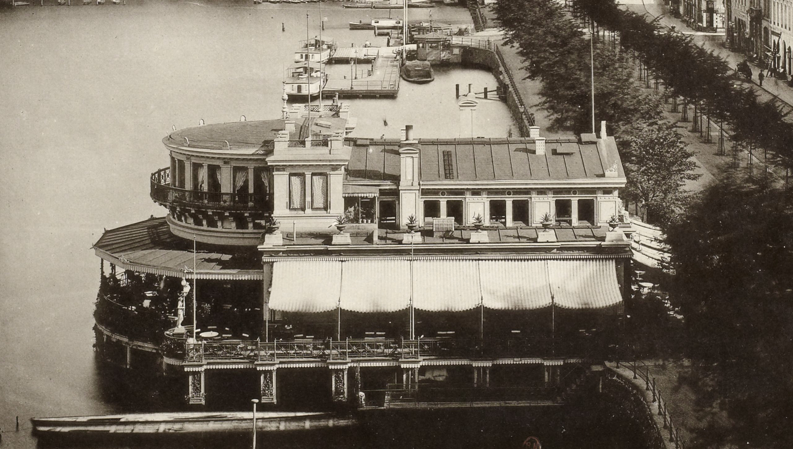 Bildausschnitt aus “Alsterdamm und Jungfernstieg”. Inhalt einer Bildmappe “Hamburg” mit 32 Photodrucken.